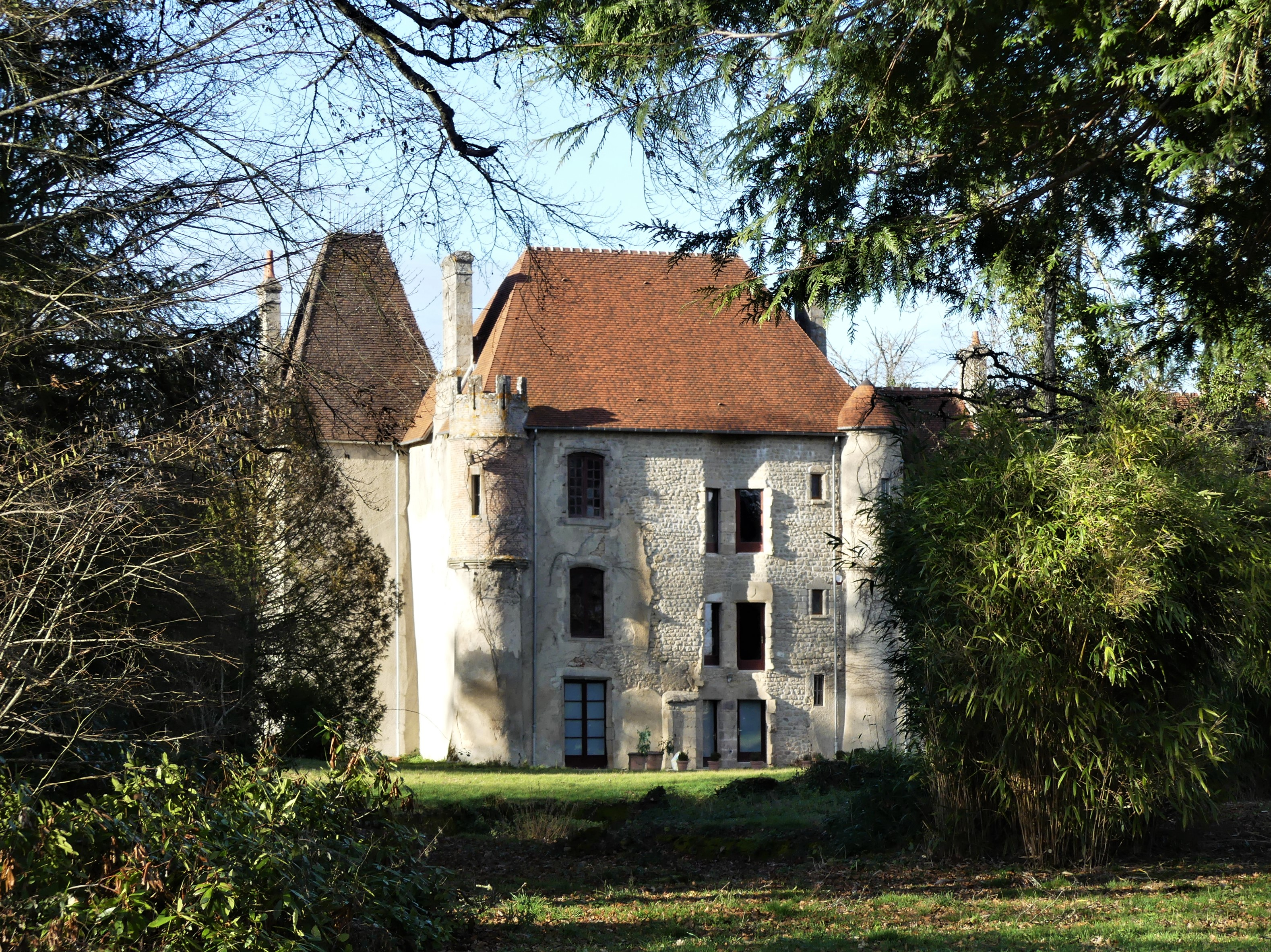 Le château d'Orgnat, Saint-Dizier-la-Tour, Creuse, France.